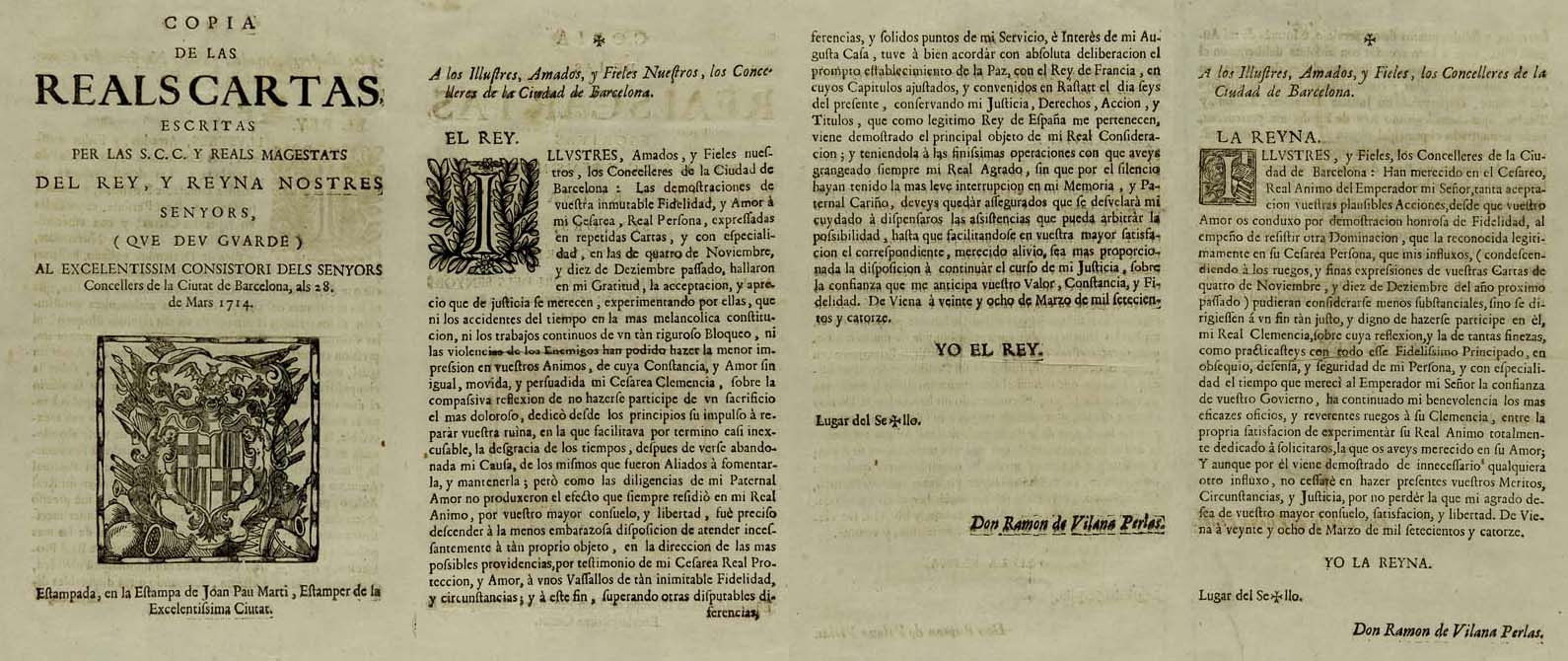 Carta de Carlos de Austria anunciando el Tratado de Rastatt a los consellers de Barcelona 1714